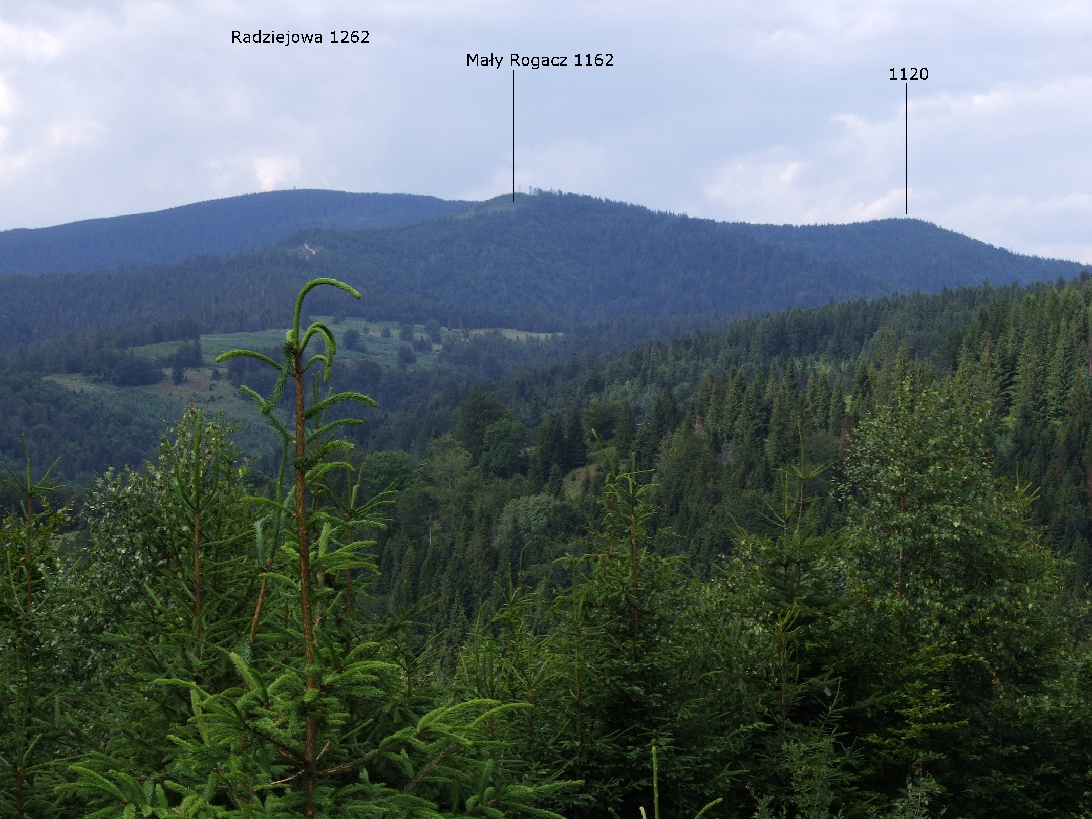 Beskid Sądecki. Widok z okolic Szczobu na Pasmo Radziejowej